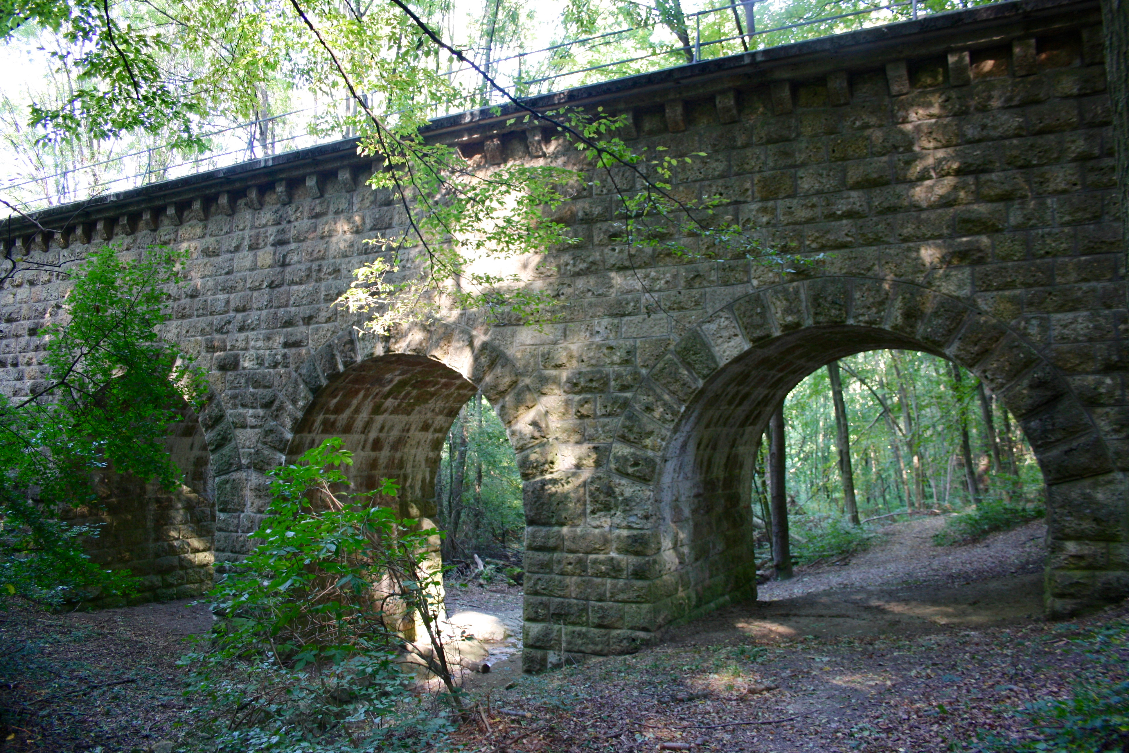 Reisingergrabenaquädukt der II. Wiener Hochquellenwasserleitung in Wien-Kalksburg.